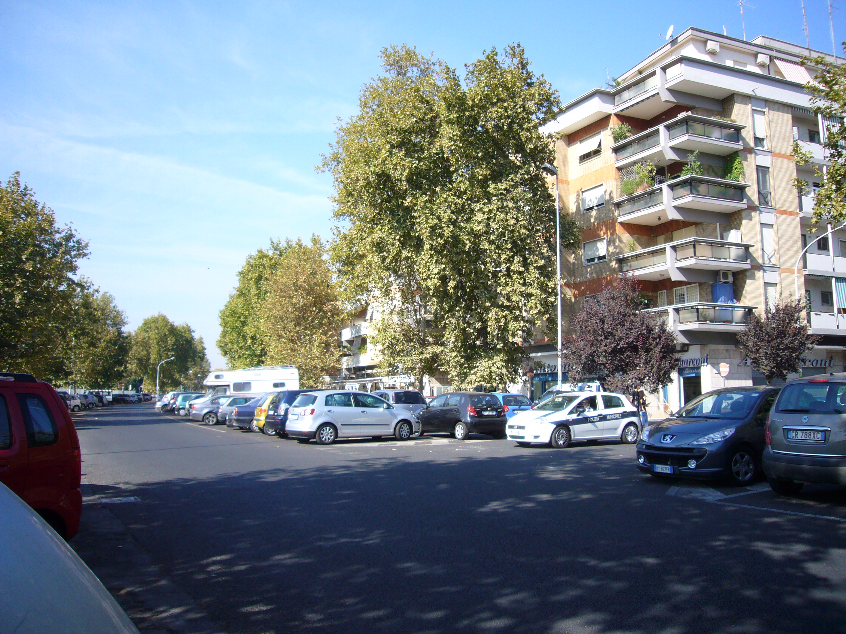 Roma, lungotevere di Pietra Papa verso ponte Marconi